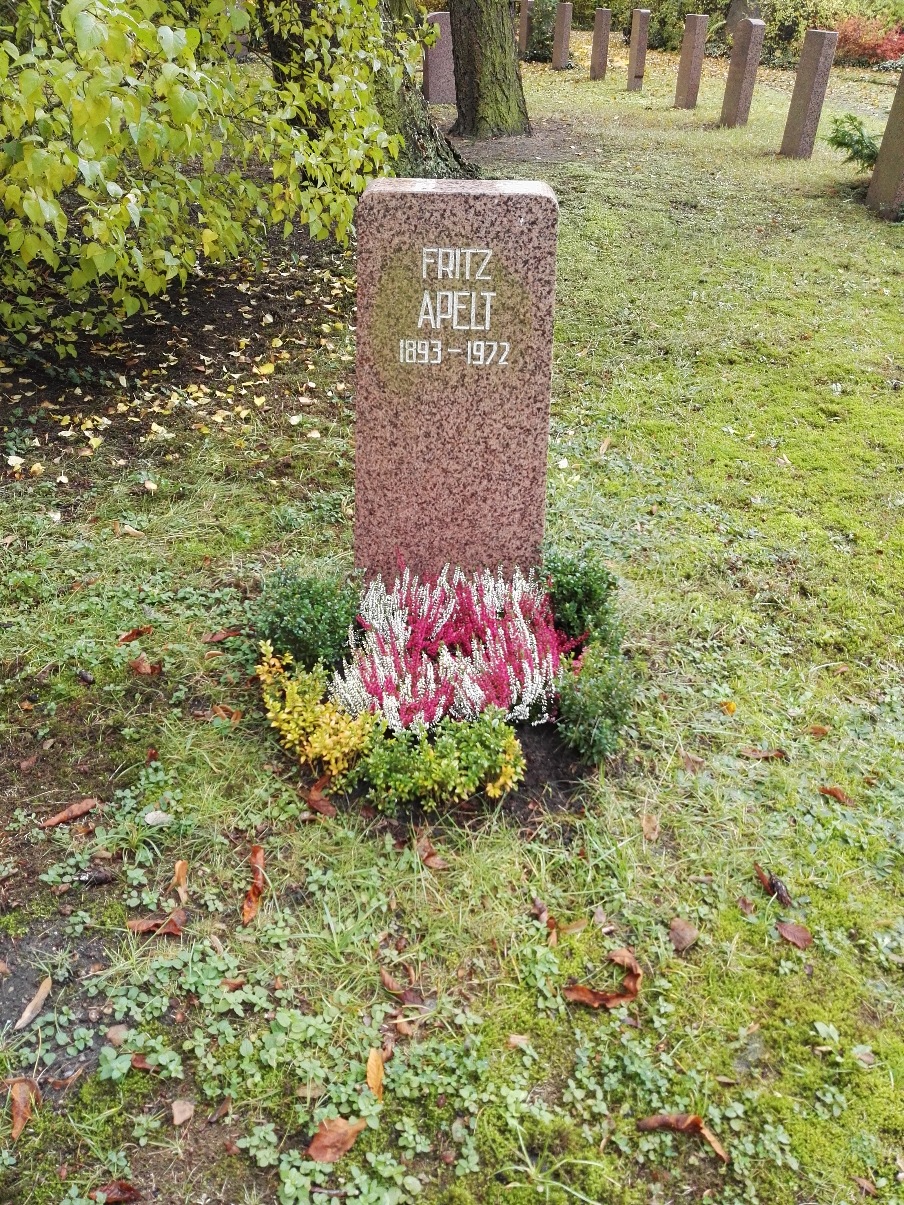 Grab von Fritz Apelt auf dem Sozialistenfriedhof des Zentralfriedhofs Friedrichsfelde